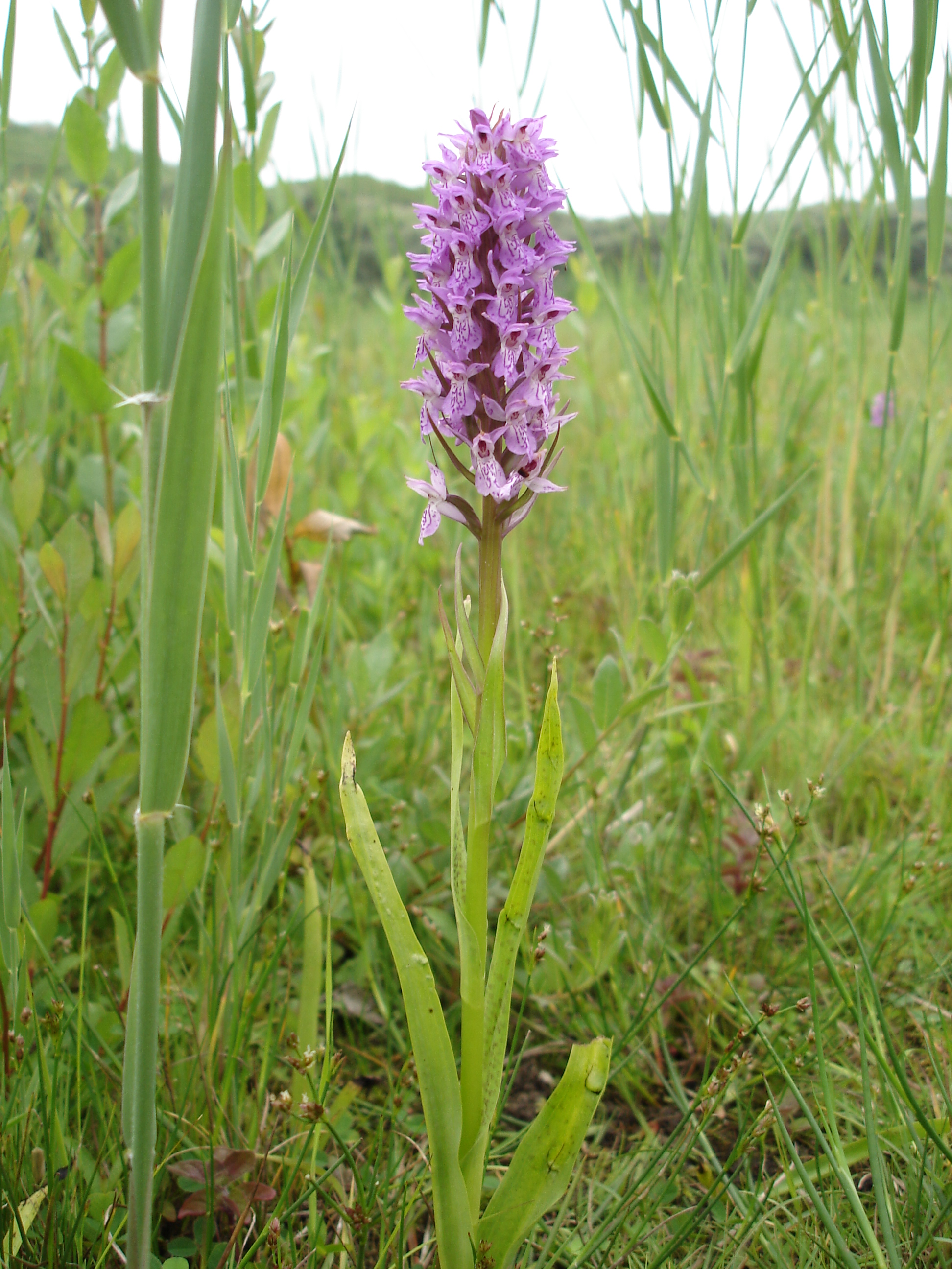 Vleeskleurige orchis (Dactylorhiza incarnata), Noordduinen Katwijk aan Zee